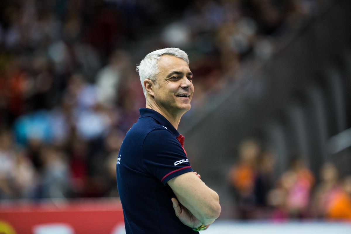 Andrea Anastasi - włoski siatkarz i trener